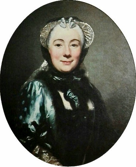 Alexander Roslin (1718–1793): Barbe-Louise-Josèphe de Nettine geborene Stoupy (1706–1775), Besitzerin der größten Bank der Österreichischen Niederlande (Sammlung Graf de la Vinâza de Laborde, Madrid).